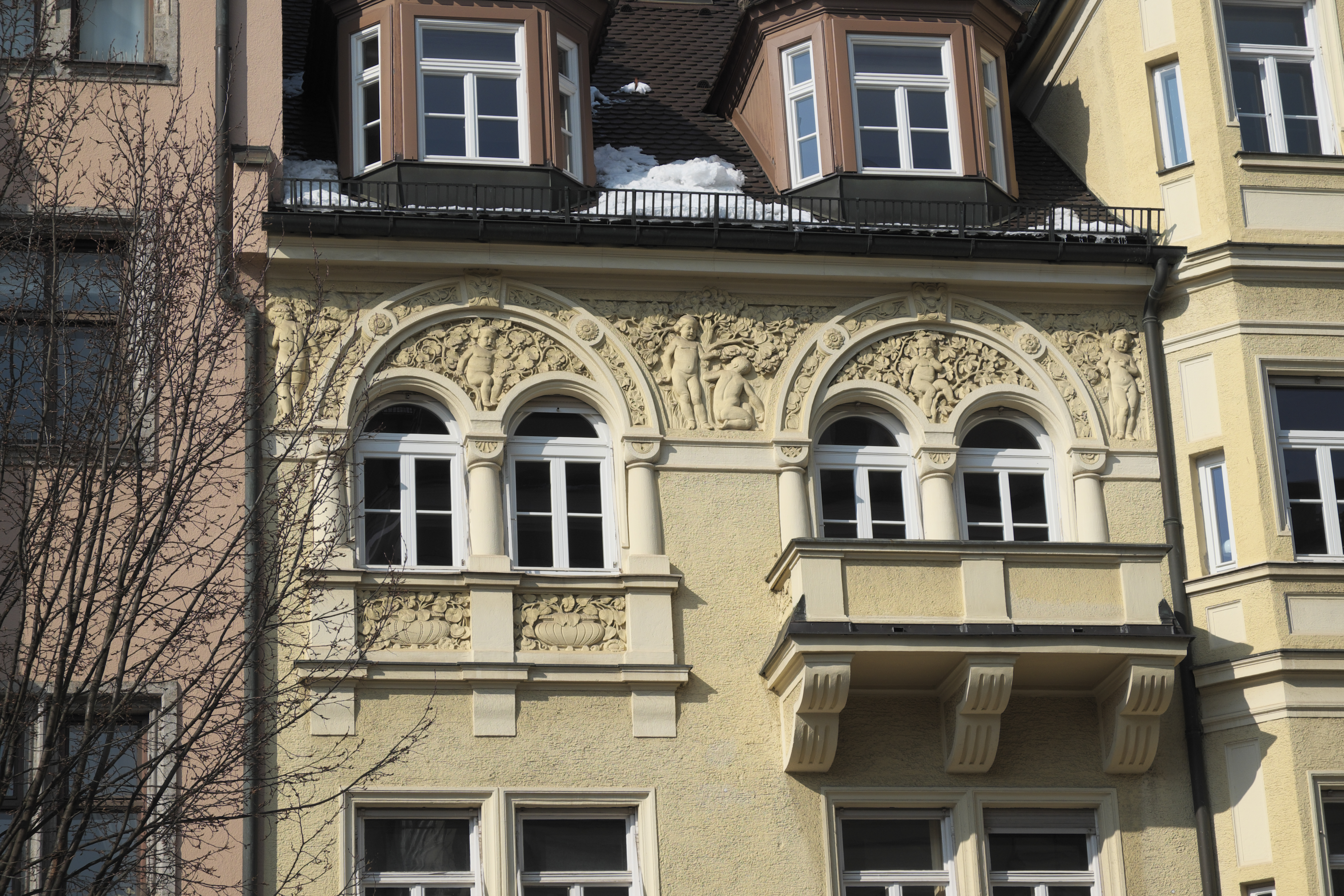 Wohnhaus in der Richard-Wagner-Straße 9 im Stadtbezirk Maxvorstad in München (Bayern/Deutschland)